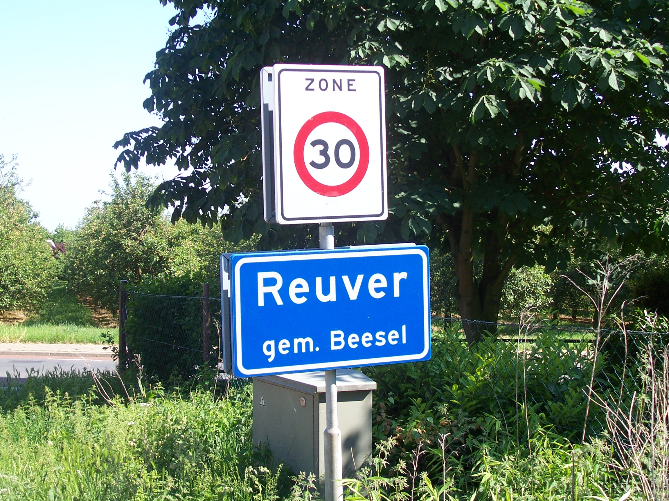 Plaatsnaambord van Reuver langs de Roozendealseweg (Bosweg) naar de Beeselse weg (nabij vogelsweijde)